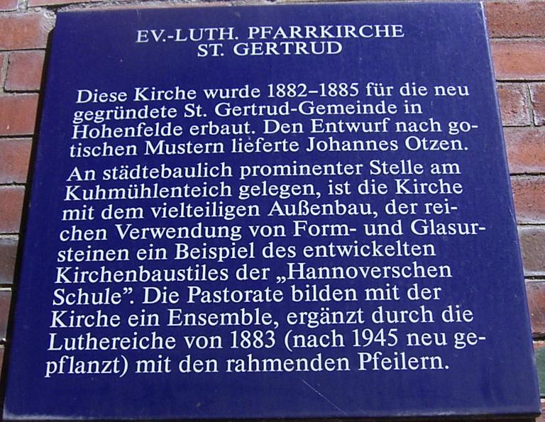 Tafel an der St.-Getrud-Kirche auf der Uhlenhorst.